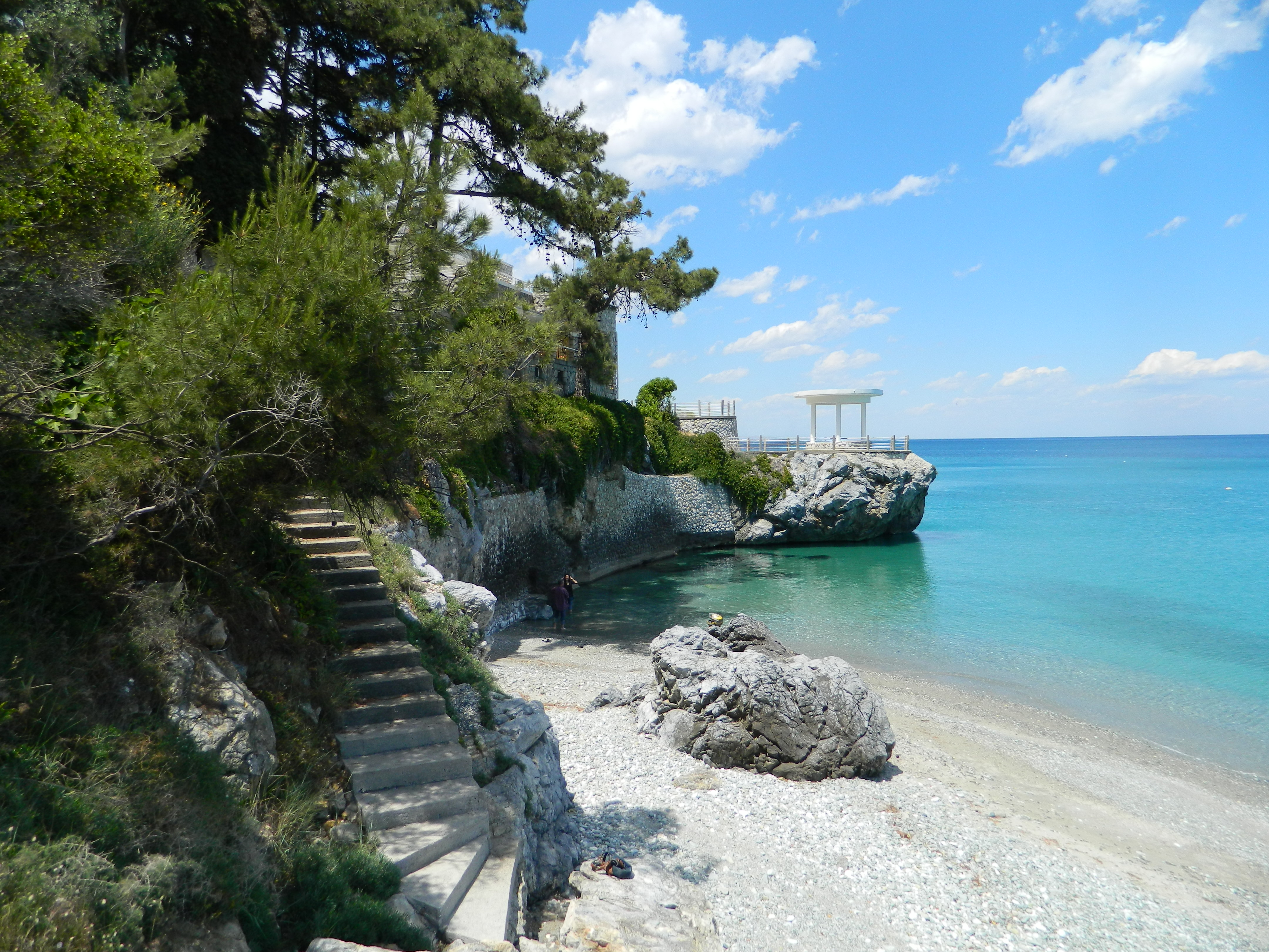 Платамон, Греция, май 2013